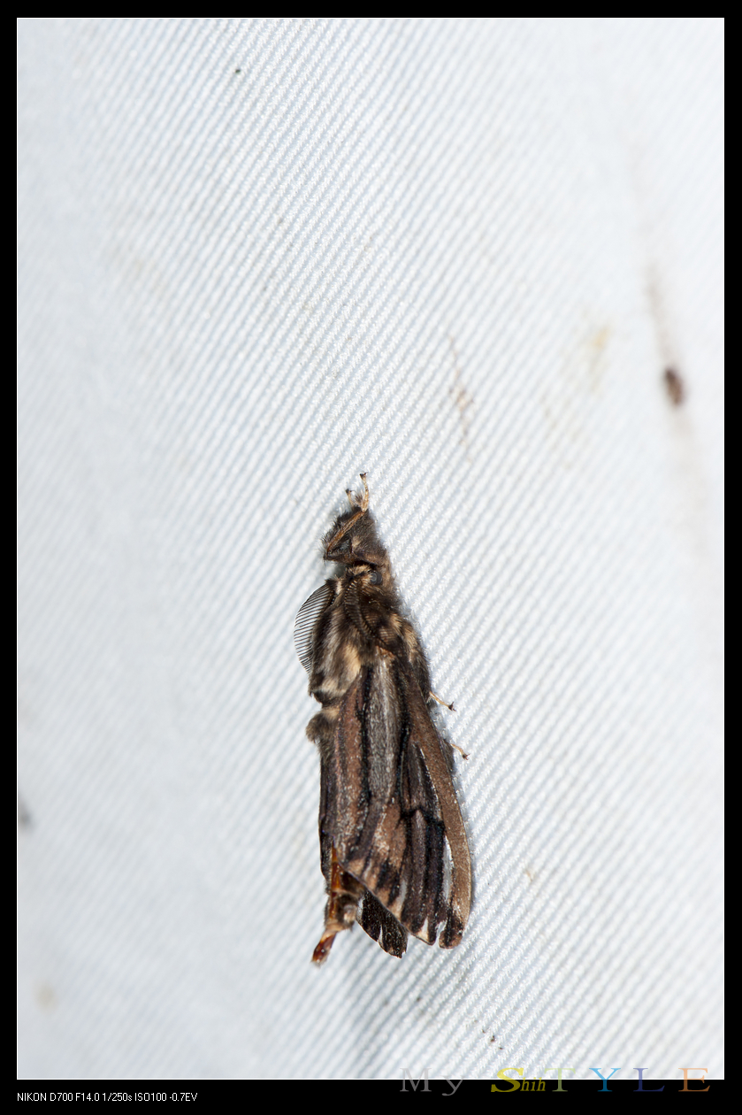 _DSJ3938 Eumeta pryeri